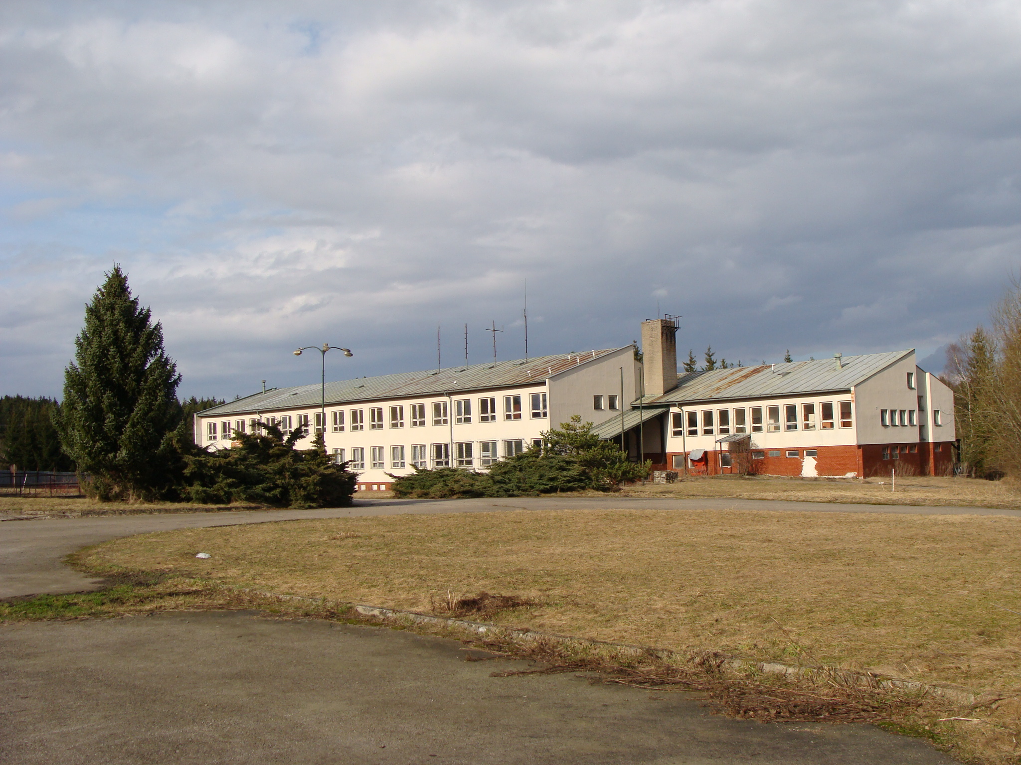 Derelict barracks of the Czech border guards near Stare Mesto, CZ / Leerstehende Grenztruppenkaserne nahe Stare Mesto (Altstadt), CZ